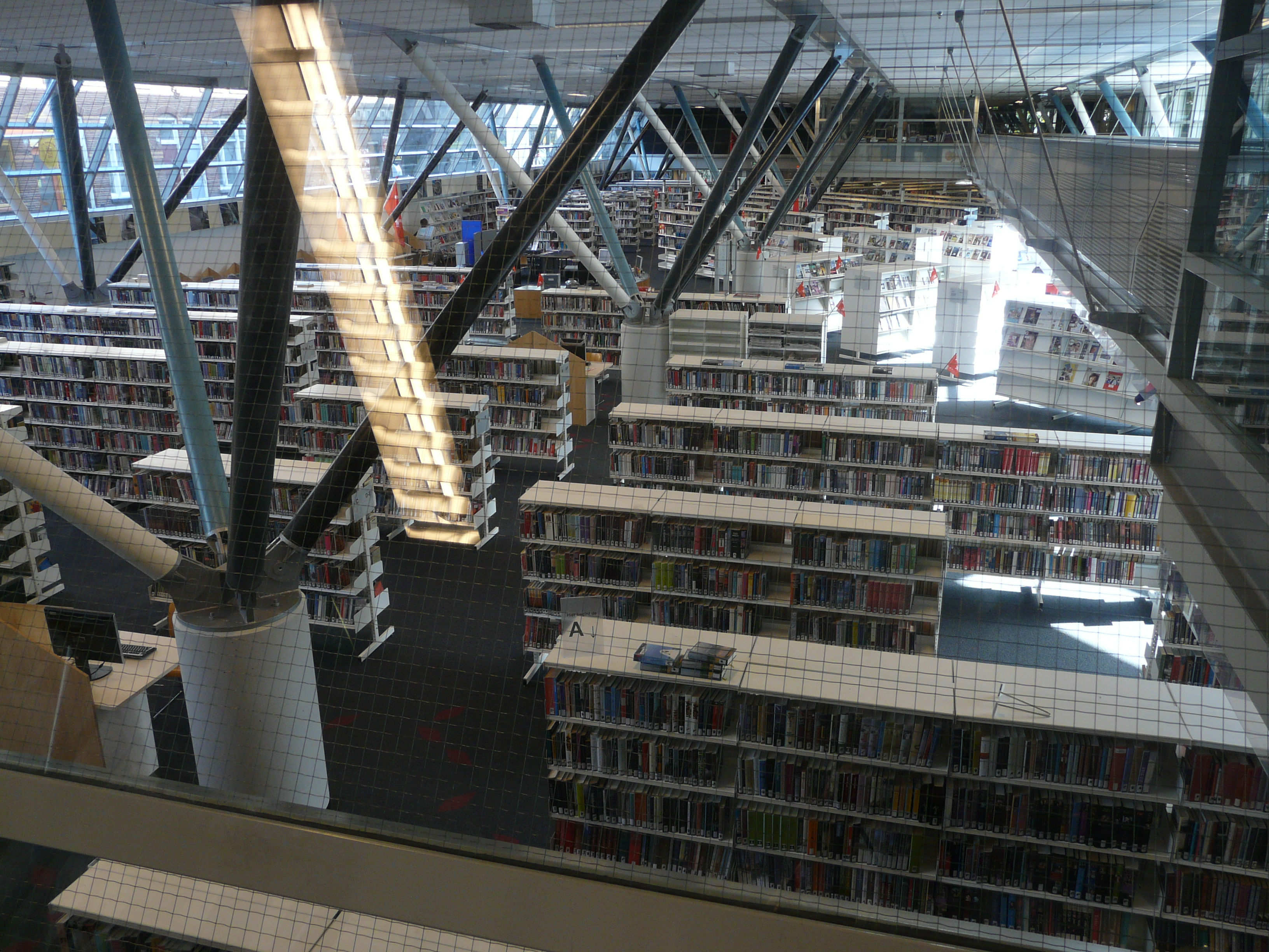 Zicht op een deel van het voormalige interieur van de Bibliotheek Breda